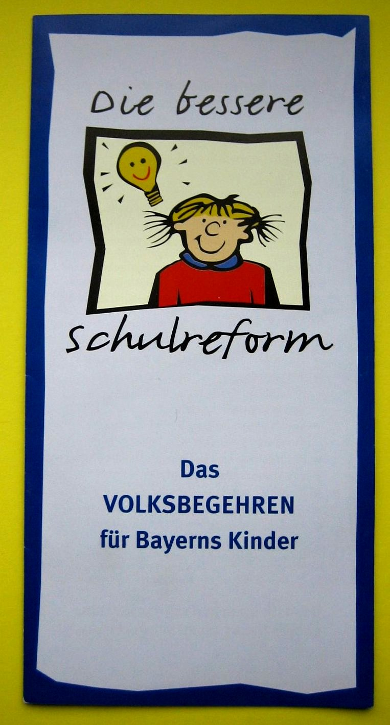 Flyer zum bayerischen Volksbegehren "Das bessere Schulkonzept" im Jahr 2000